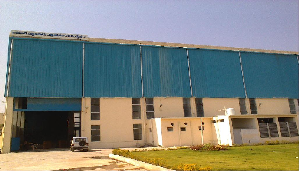 నెట్టెంపాడు ప్రాజెక్టు స్టేజ్-2